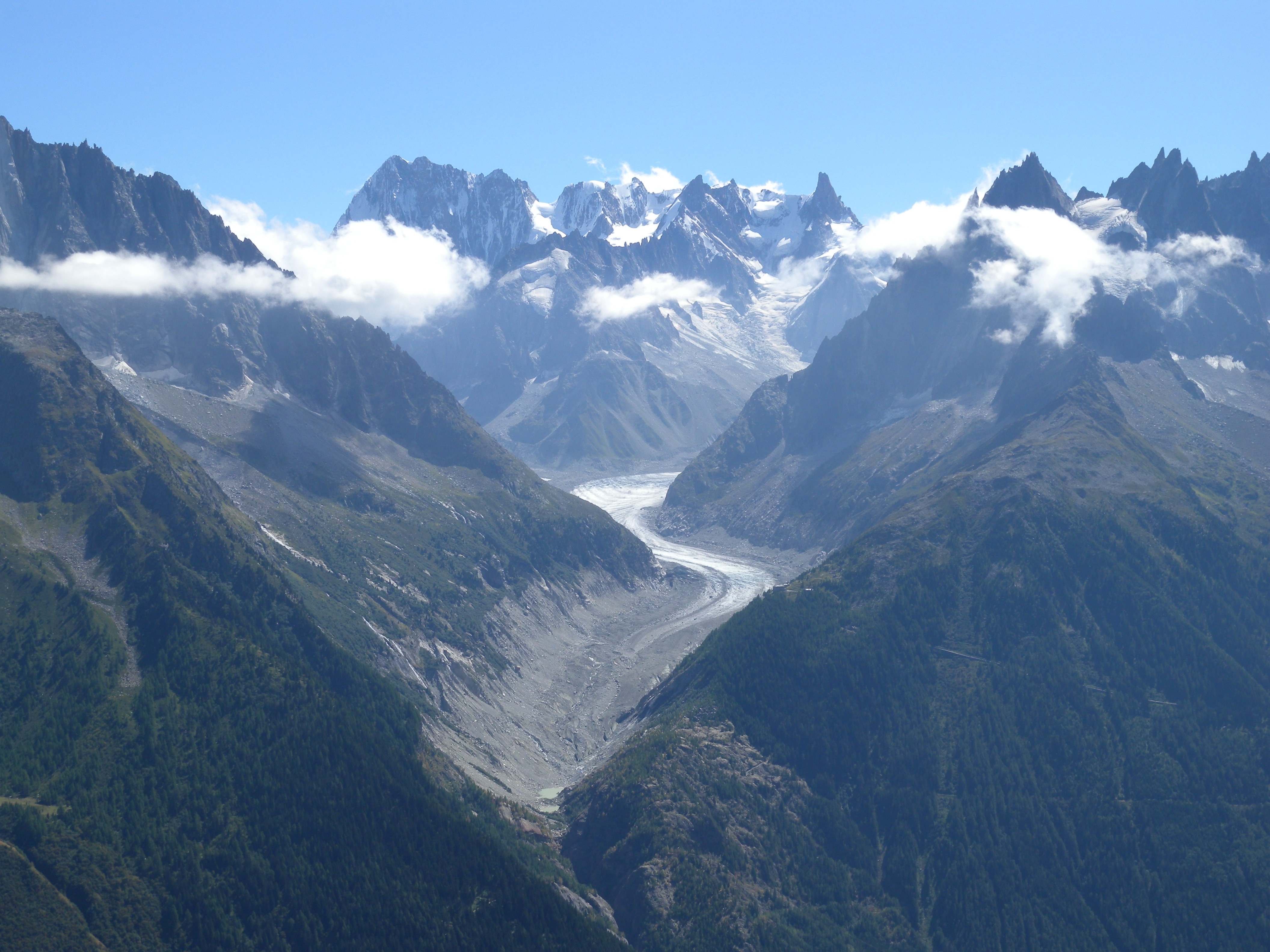 Mer de Glace vue du lac Blanc